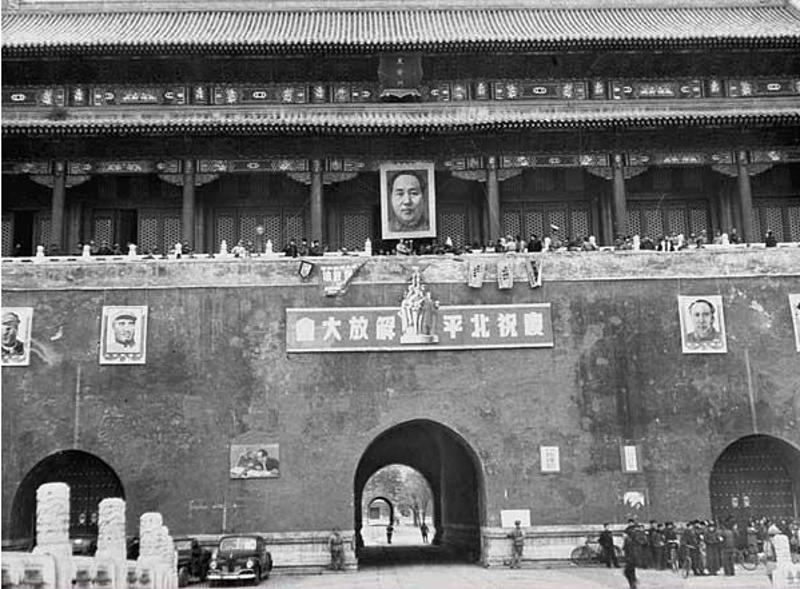 中華民國三十八年二月十二日（1949年），中國共產黨舉行的「慶祝北平和平解放大會」在天安門城樓舉行。